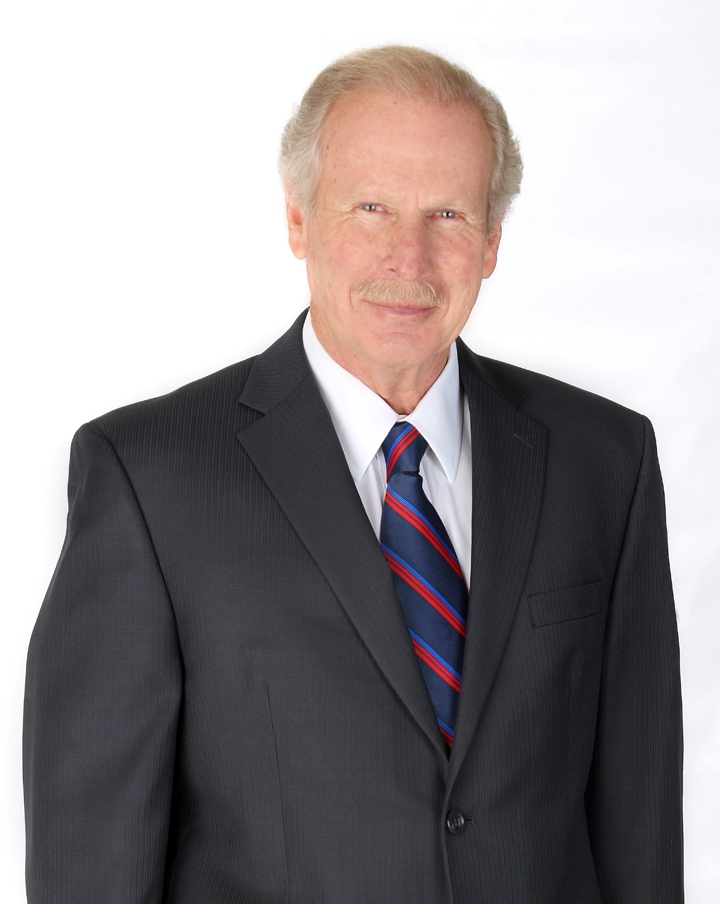 Fotografía de Alvaro Arzú Irigoyen tomada en febrero de 2014